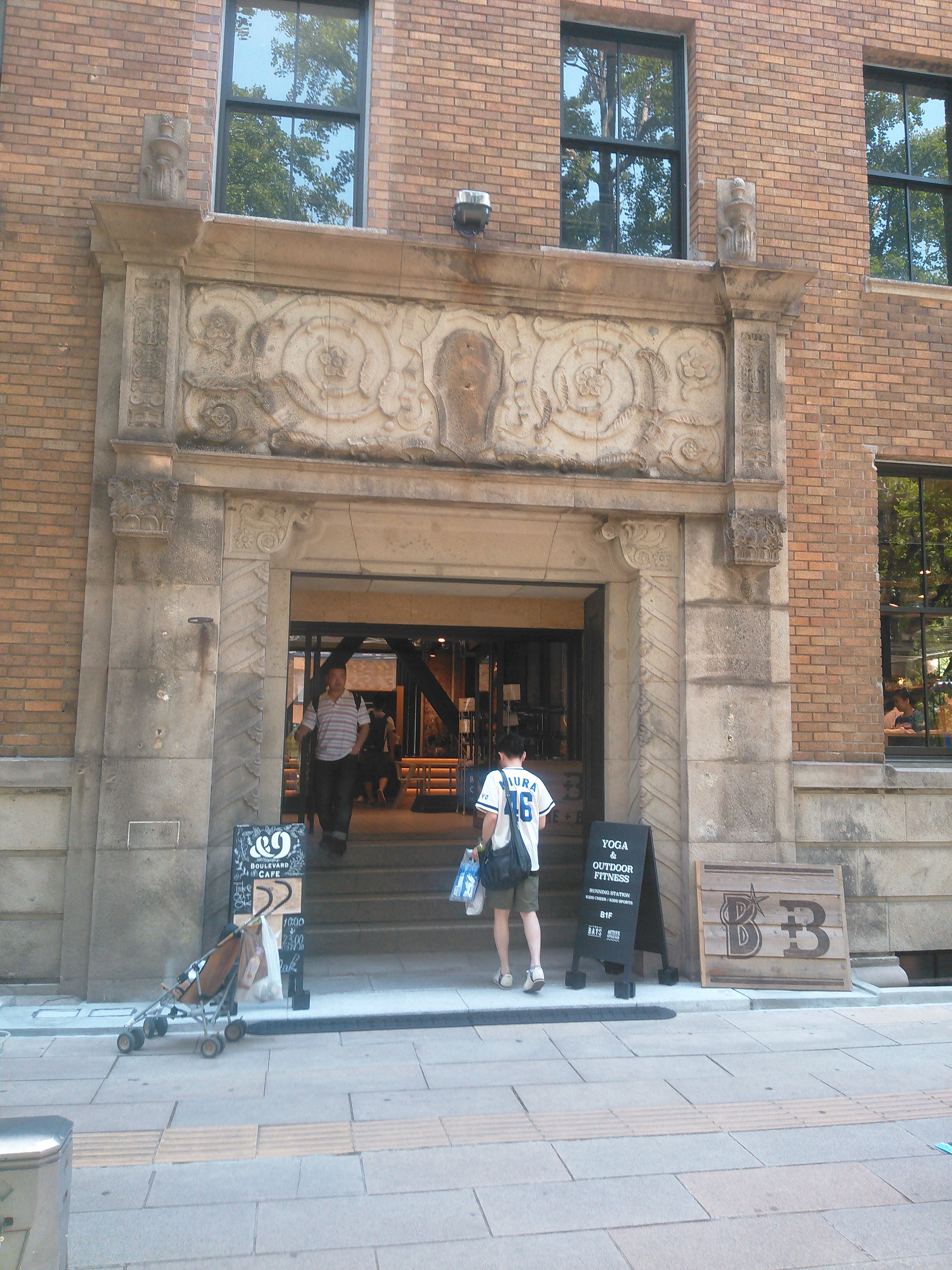 横浜市中区の「THE BAYS」。日本大通り側のエントランス。